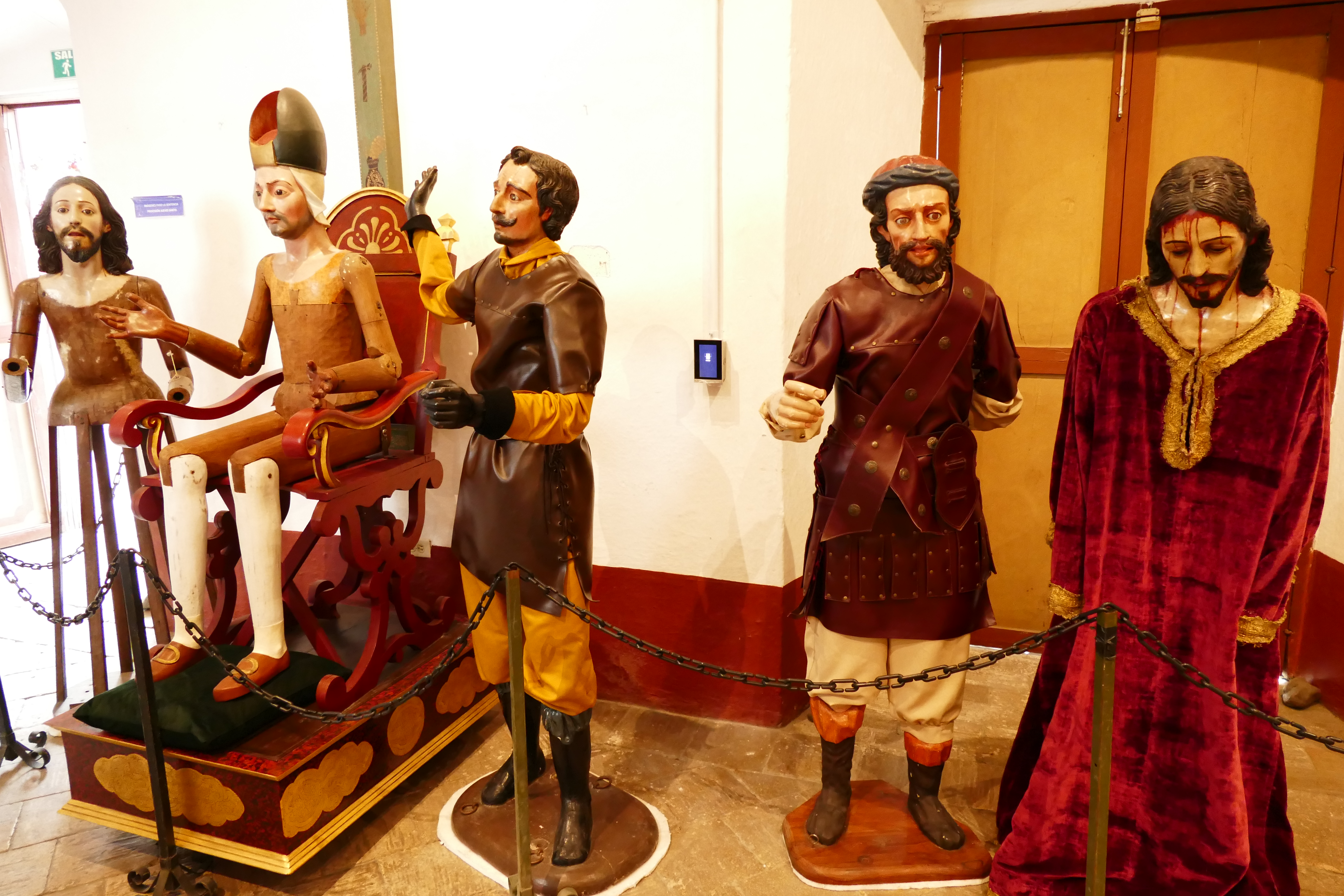 Met Pasen is er jaarlijks een week, waarbij er verschillende processies plaatsvinden in het kader van Pasen.